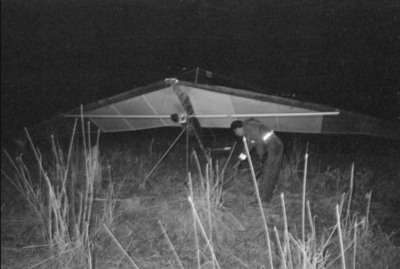 חייל בוחן את הגלשן.